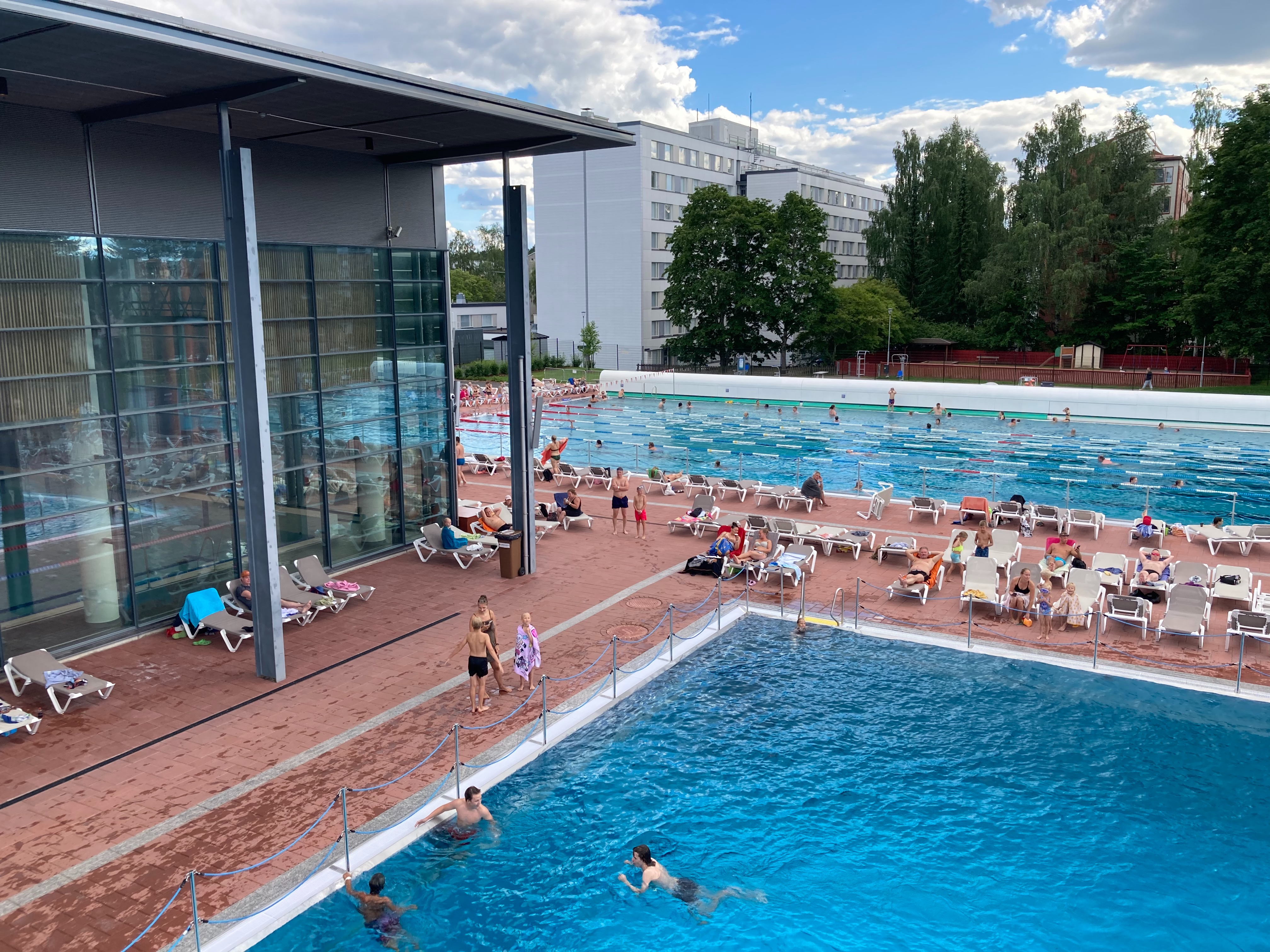 Kalevan maauimala.